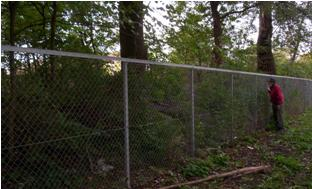 Nakskovs fæstning. Volden ved Byskolen